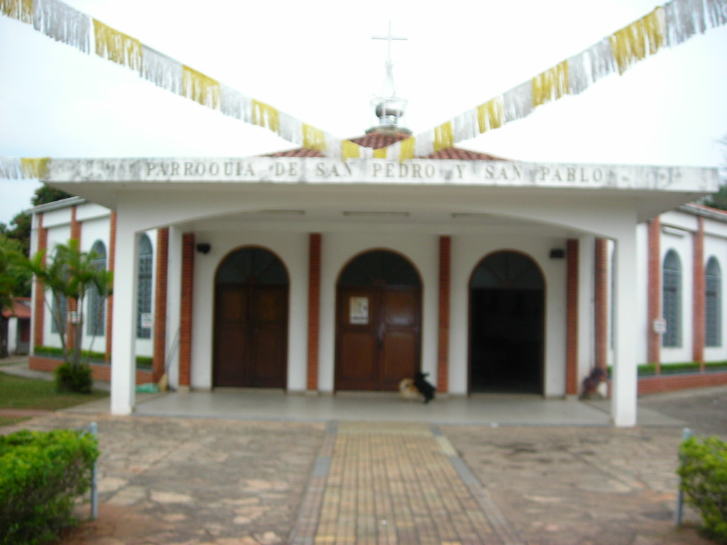 iglesia